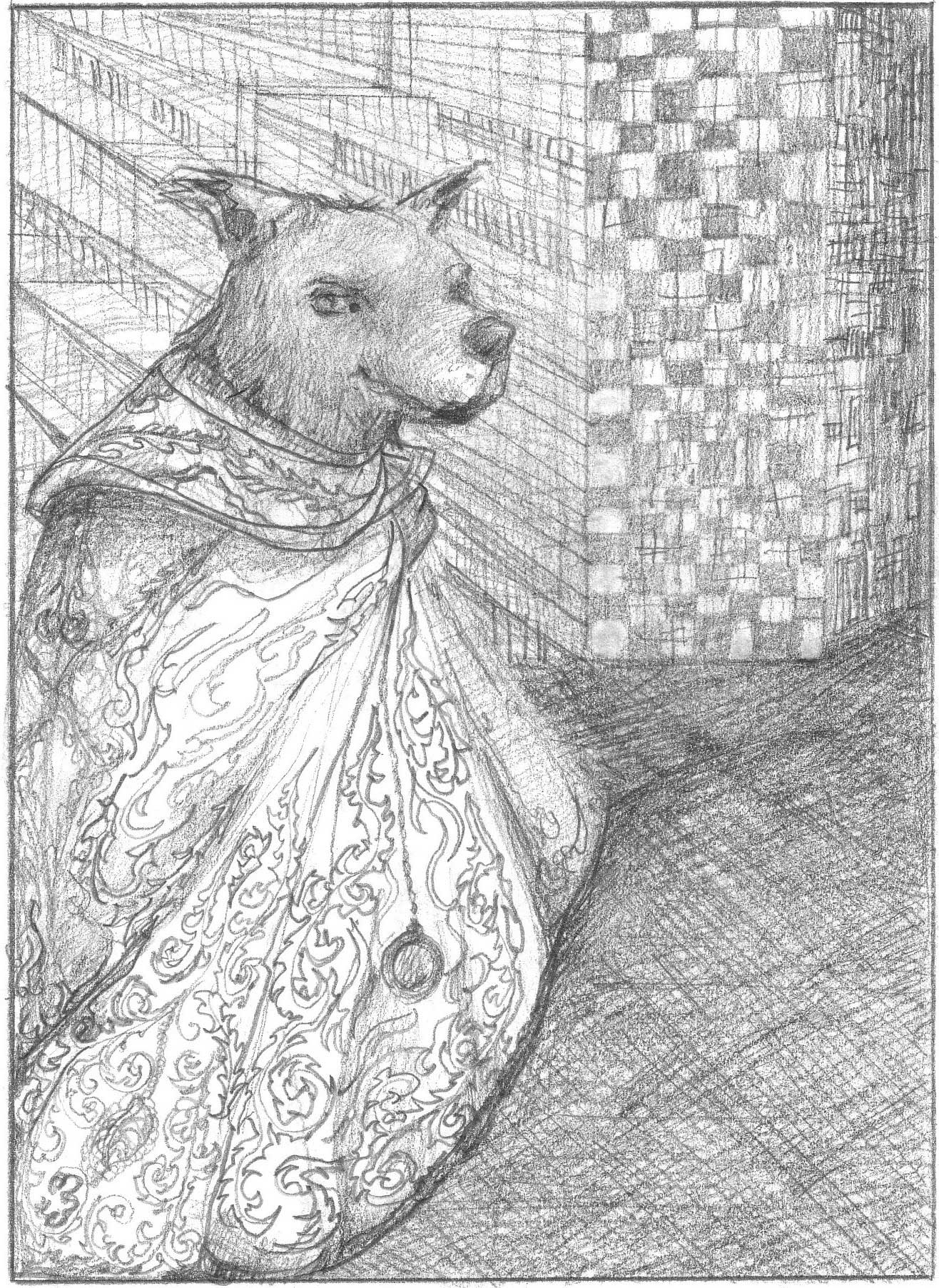 Visión artística del perro Paco de la ilustradora Carmen Romero.